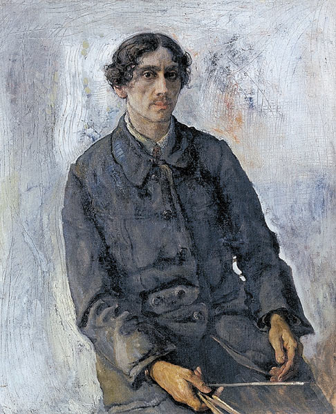 Автопортрет